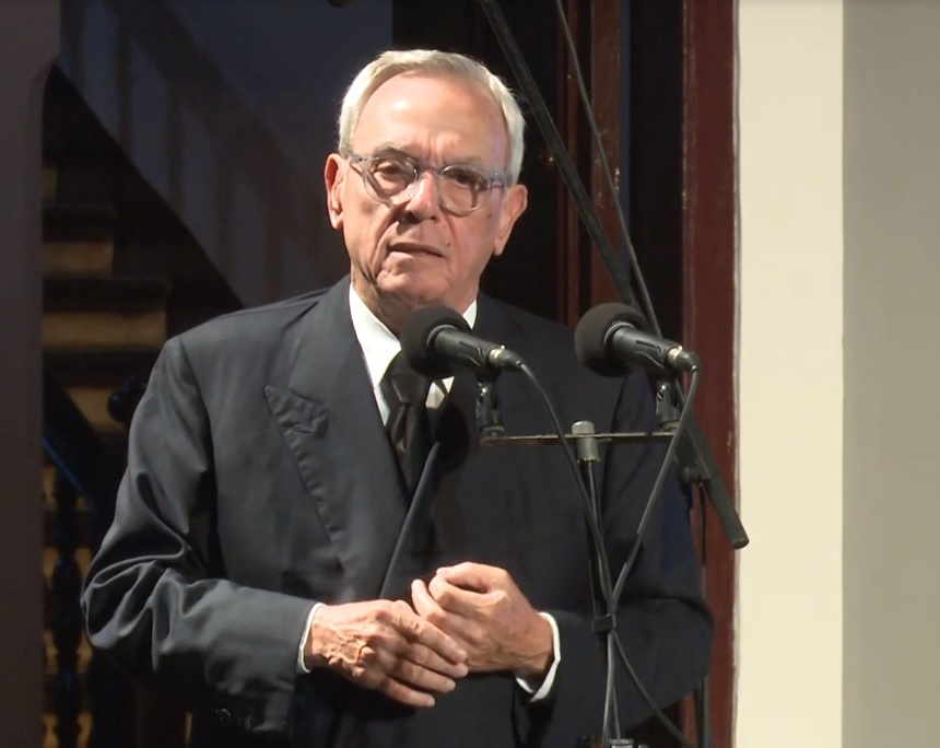 Palabras de Eusebio Leal Spengler durante la velada por el Bicentenario de Carlos Manuel de Céspedes (1819-1874)